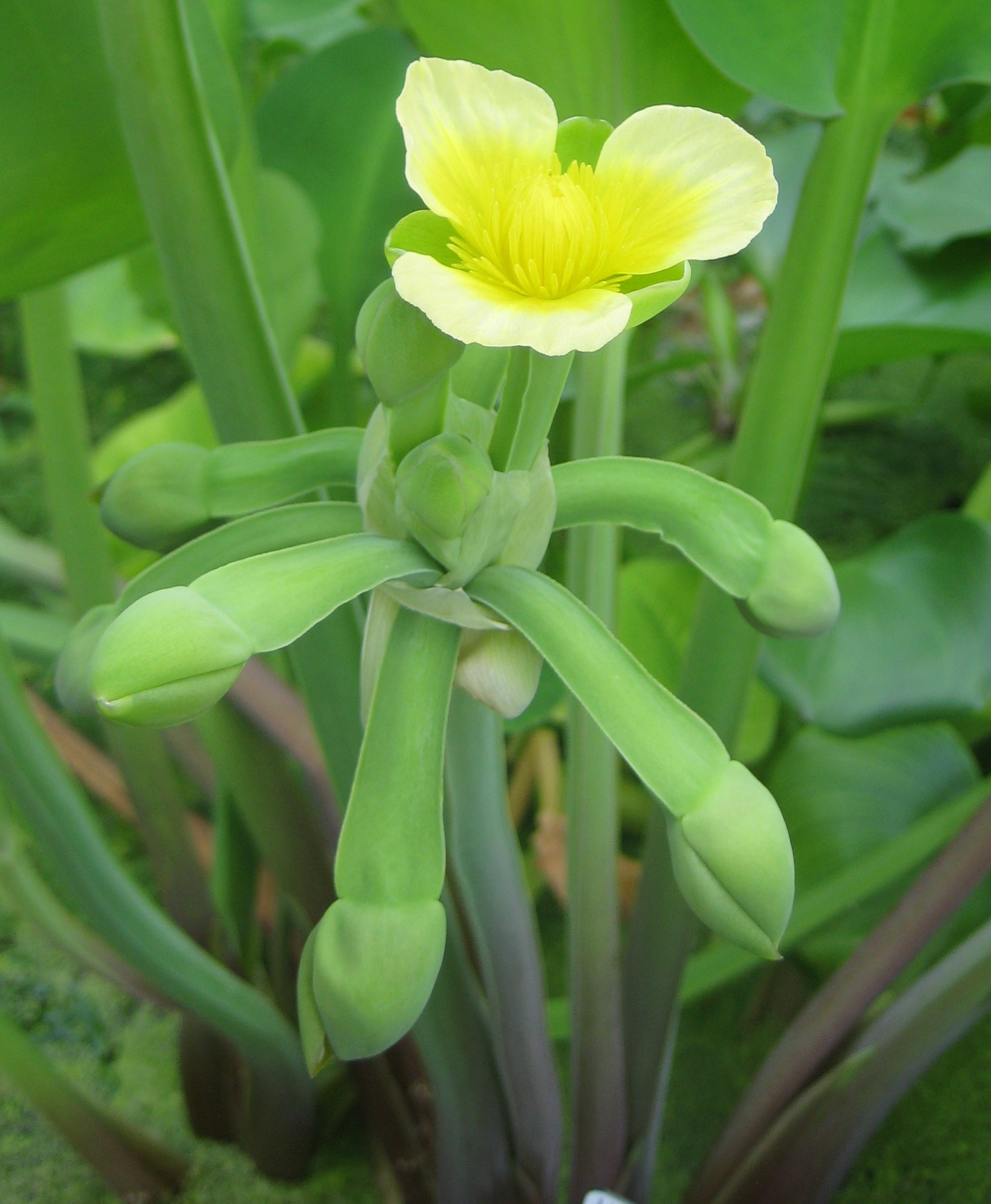 Limnocharis flava im Botanischen Garten Dresden